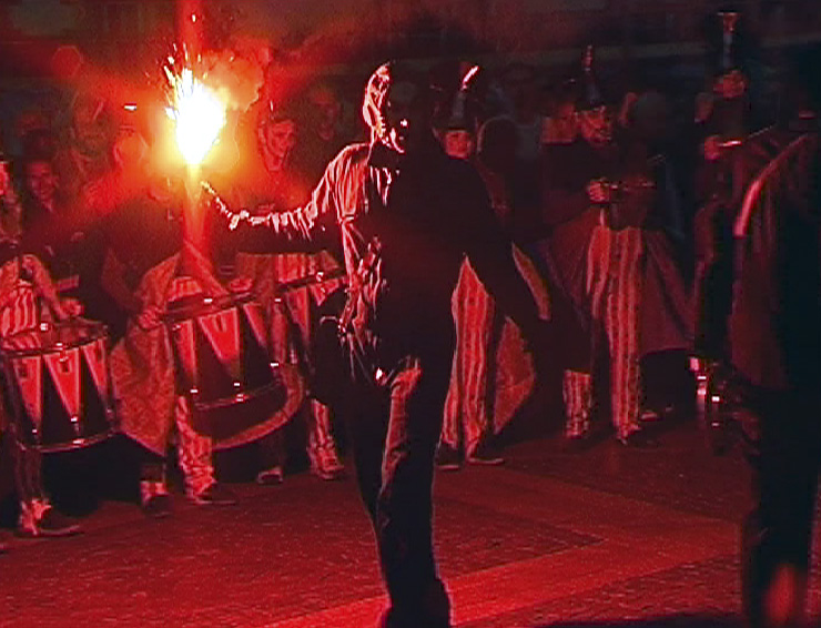 Internationale Kulturtage der Stadt Dortmund 2000, Transe Express: „Lâcher de Violons“ (Straßentheater)